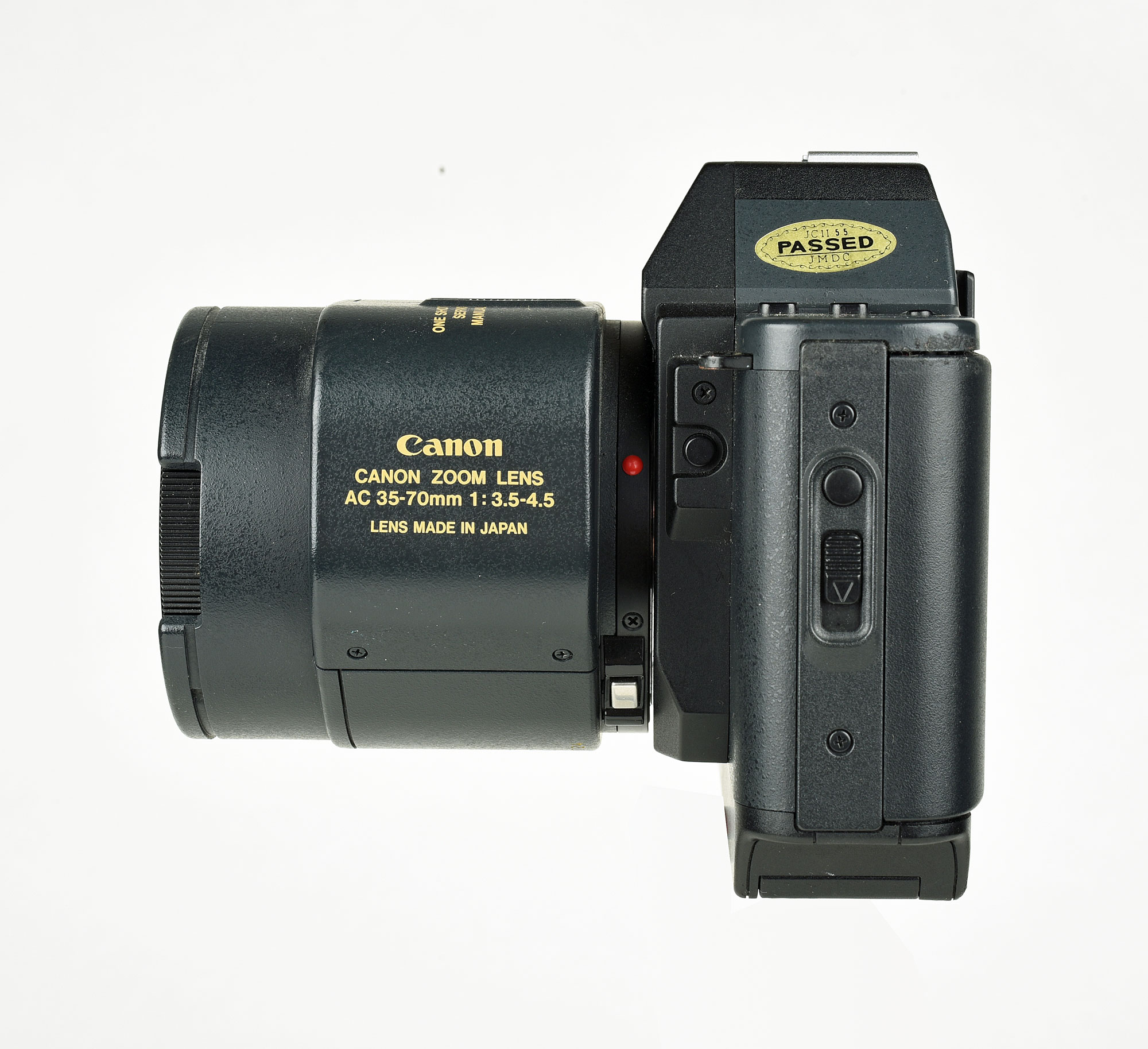 Canon T80 avec un zoom Canon AC 35-70mm 1:3.5-1:4.5 de profil